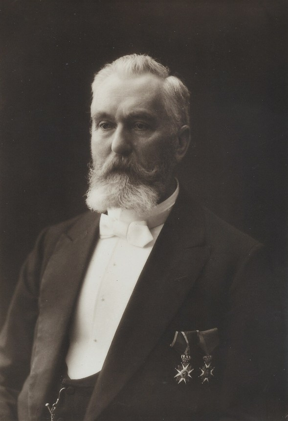 Portrettfotografi av Richard Andvord.